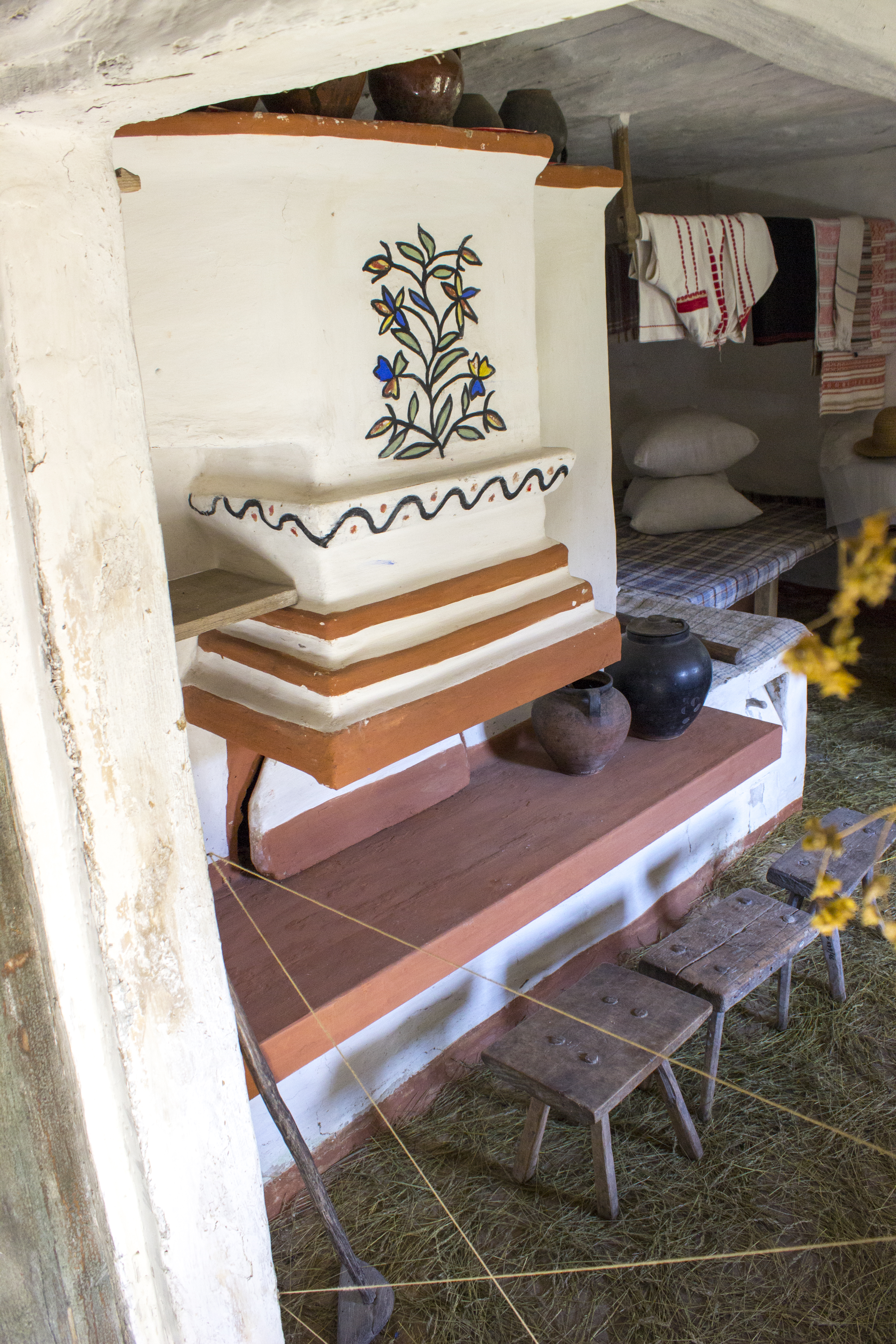 кін. XVIII ст. Хата з села Луги Чечельницького району Вінницької області